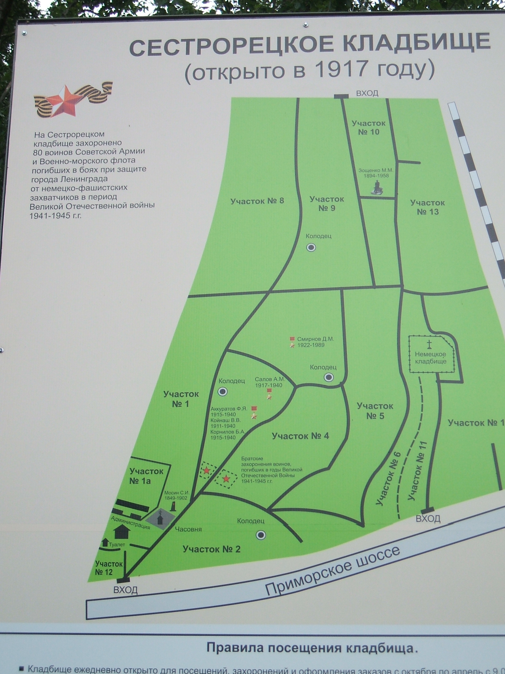 план Сестрорецкого кладбища в СПб